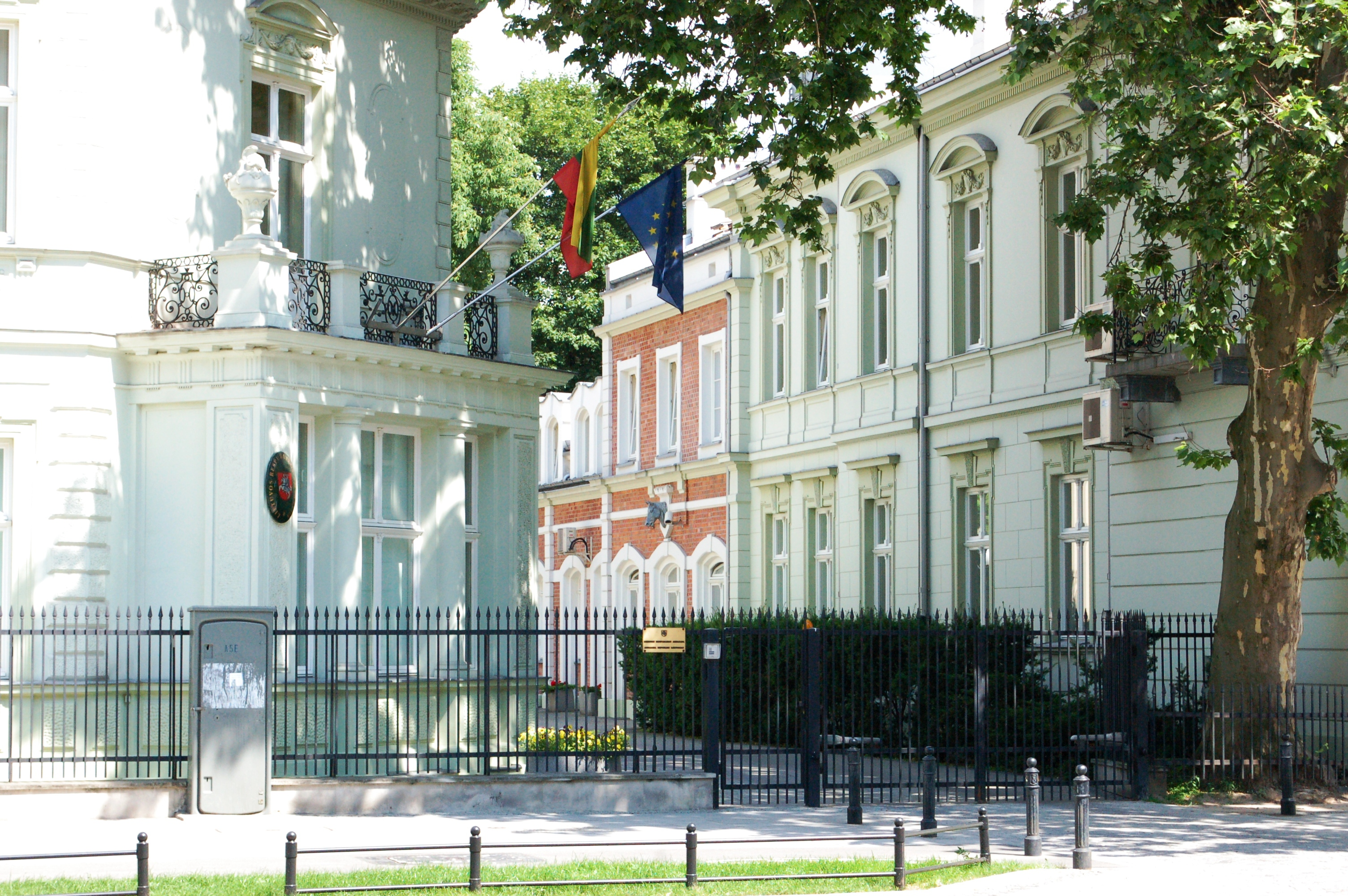 Warschau